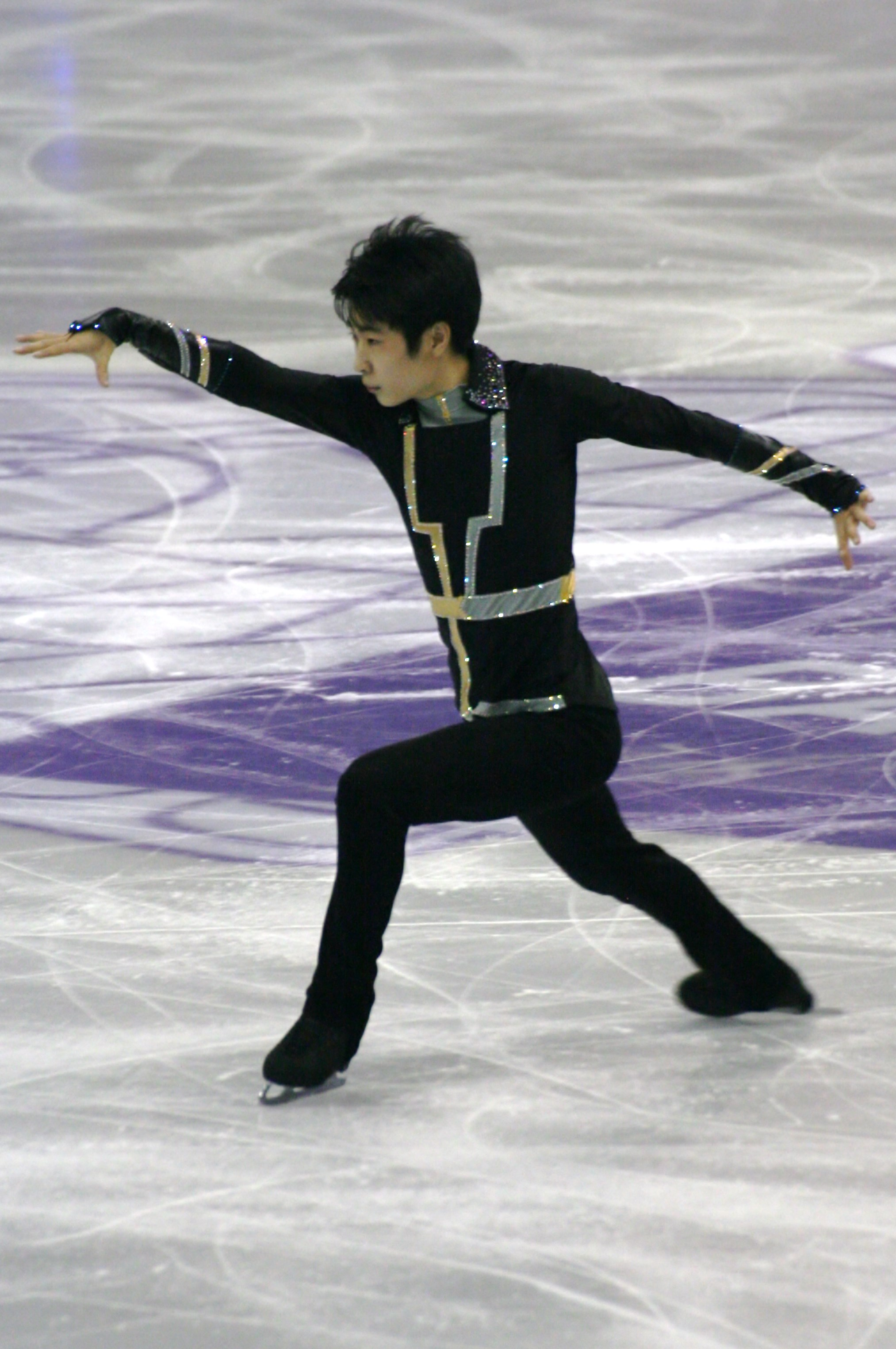 Цзинь Боян (Китай) на финале Гран-при по фигурному катанию 2015-2016.